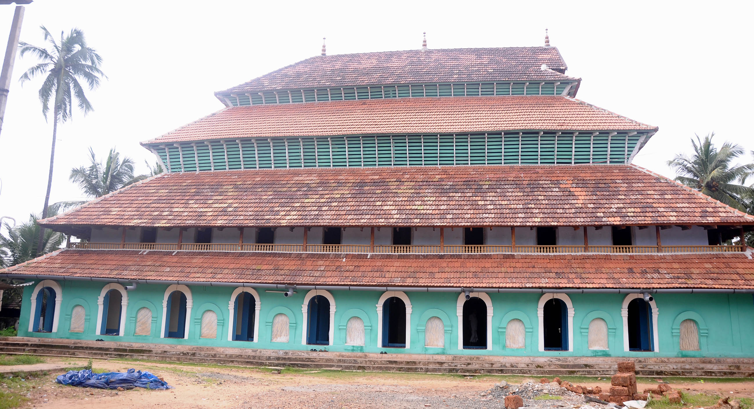 കോഴിക്കോട് കുറ്റിച്ചിറ മിശ്കാല്‍ പള്ളി